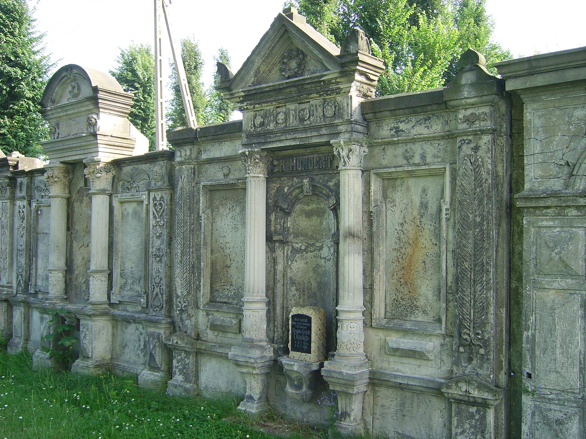 Czerwona Woda - zespół kościelny: ogrodzenie z wmurowanymi nagrobkami przy kościele p.w. Wniebowzięcia NMP (zabytek nr A/1050/1-2 z 18.03.2008)